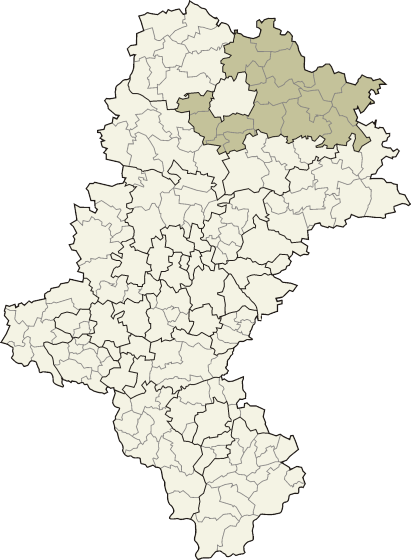 Powiat częstochowski w województwie śląskim